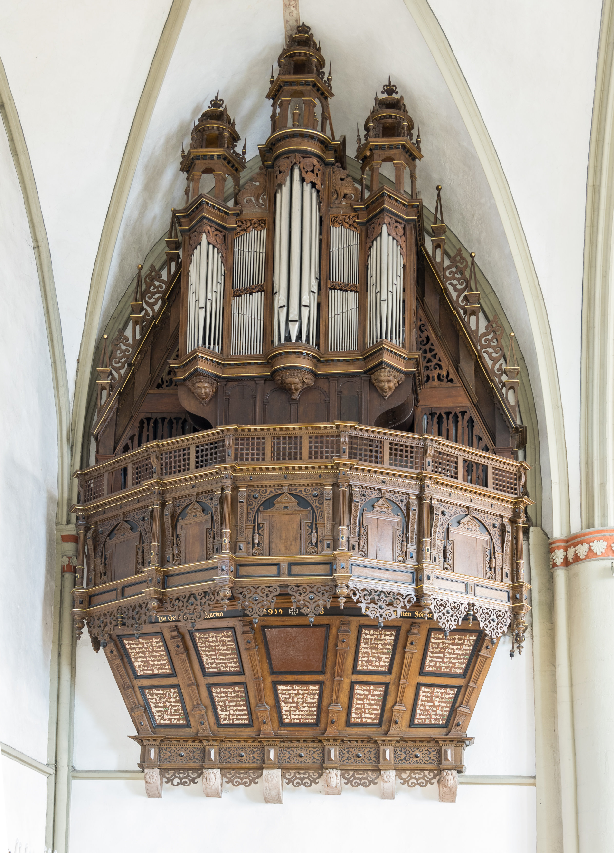 Schwalbennestorgel in der evangelisch-lutherischen Kirche St. Marien in Lemgo